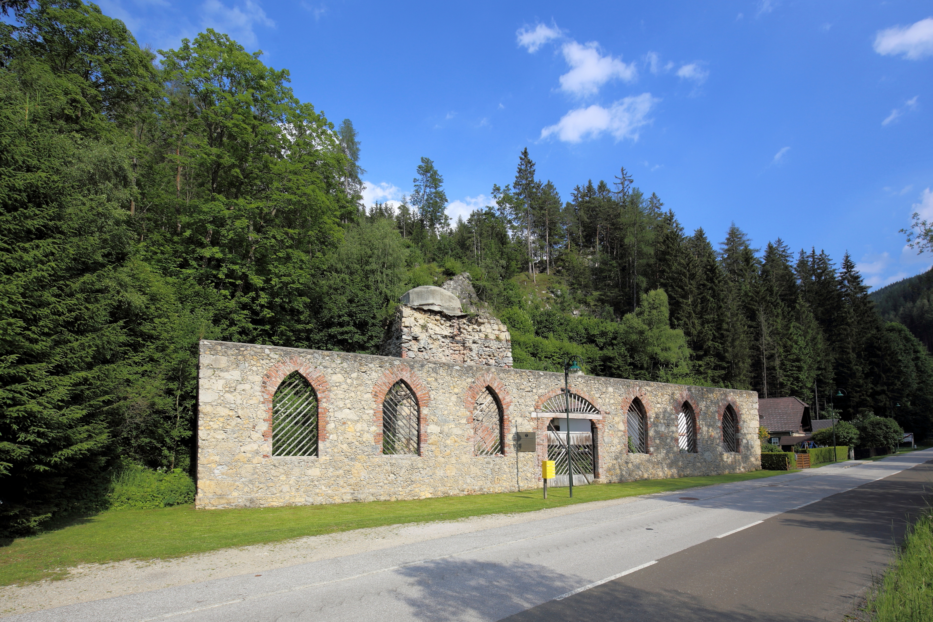 Die Alfredhütte in Steinhaus am Semmering, ein Ortsteil der österreichischen Gemeinde Spital am Semmering im Bezirk Bruck-Mürzzuschlag in der Steiermark. Die Hütte im „Industriegotik-Stil“ mit Spitzbogenfenstern wurde 1838/1839 im Auftrag von Alfred Fürst von Schönburg-Hartenstein errichtet, produzierte bis zu 3000 Tonnen Roheisen pro Jahr und wurde 1885 stillgelegt.